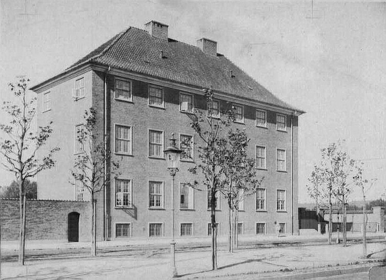 Statsprøveanstalten på Amager Boulevard af Hack Kampmann